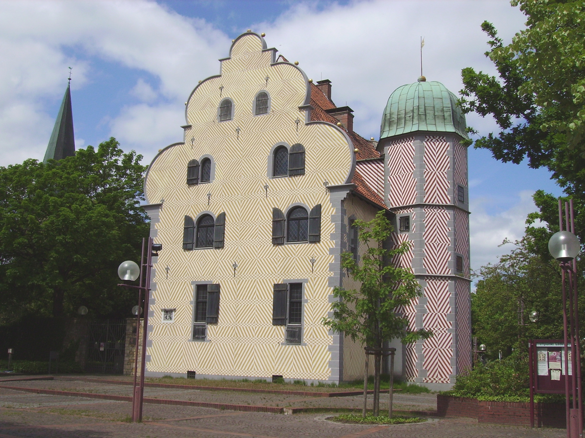 Der Ledenhof in Osnabrück, rechts der Treppenturm, im Vordergrund der Palas